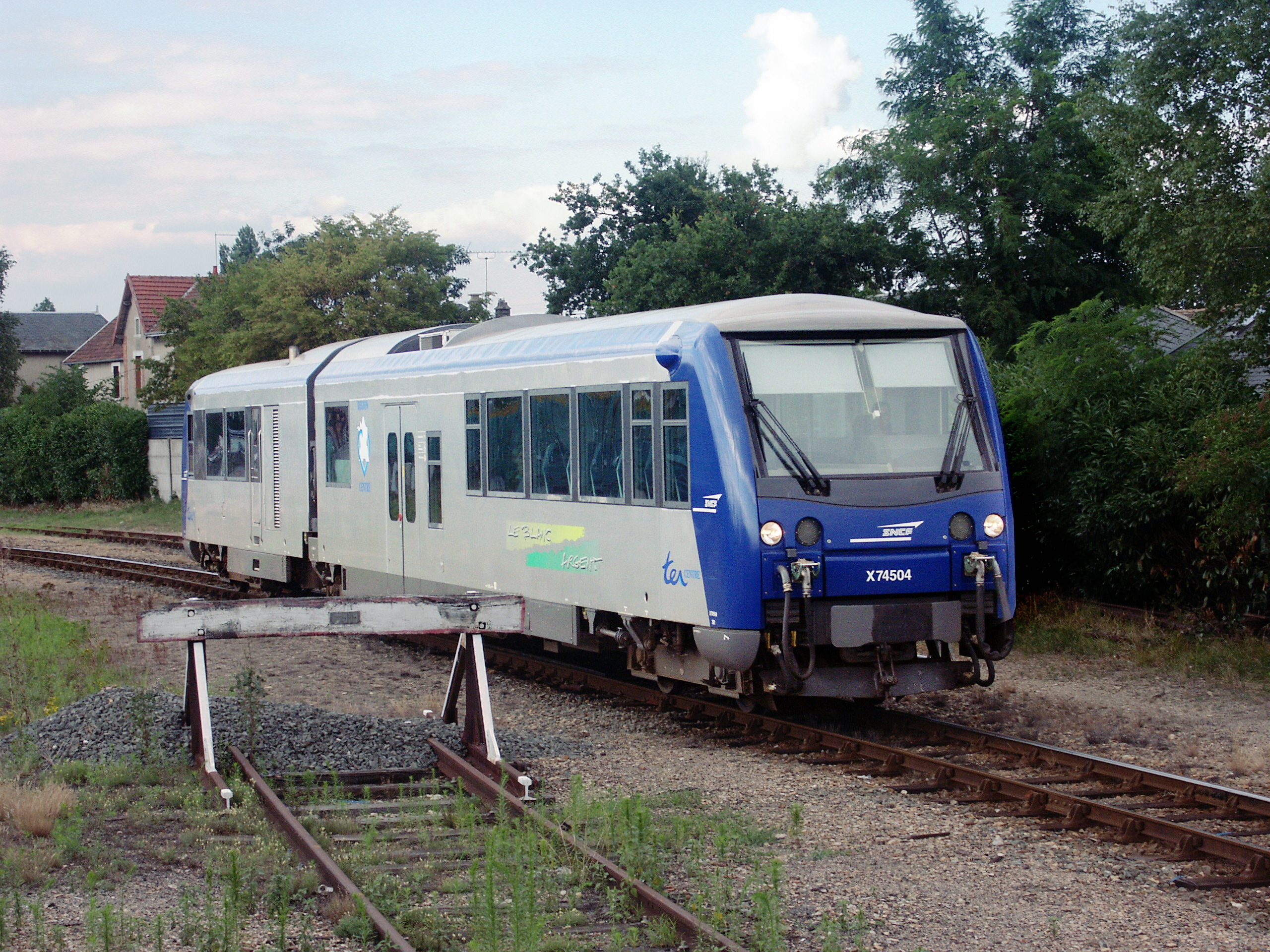 Ein Meterspurtriebwagen der ter verlässt Salbris Richtung Leblanc. 27.7.2004